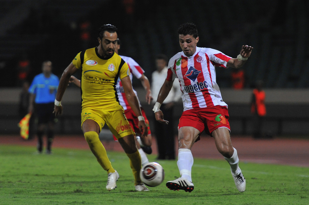 WAC vs FUS